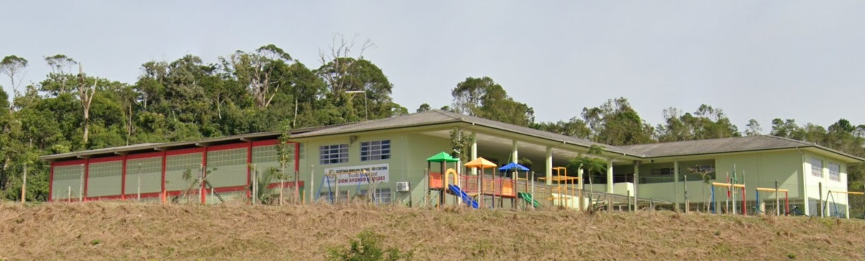 Escola Municipal de Ensino Fundamental D Afonso Niehues